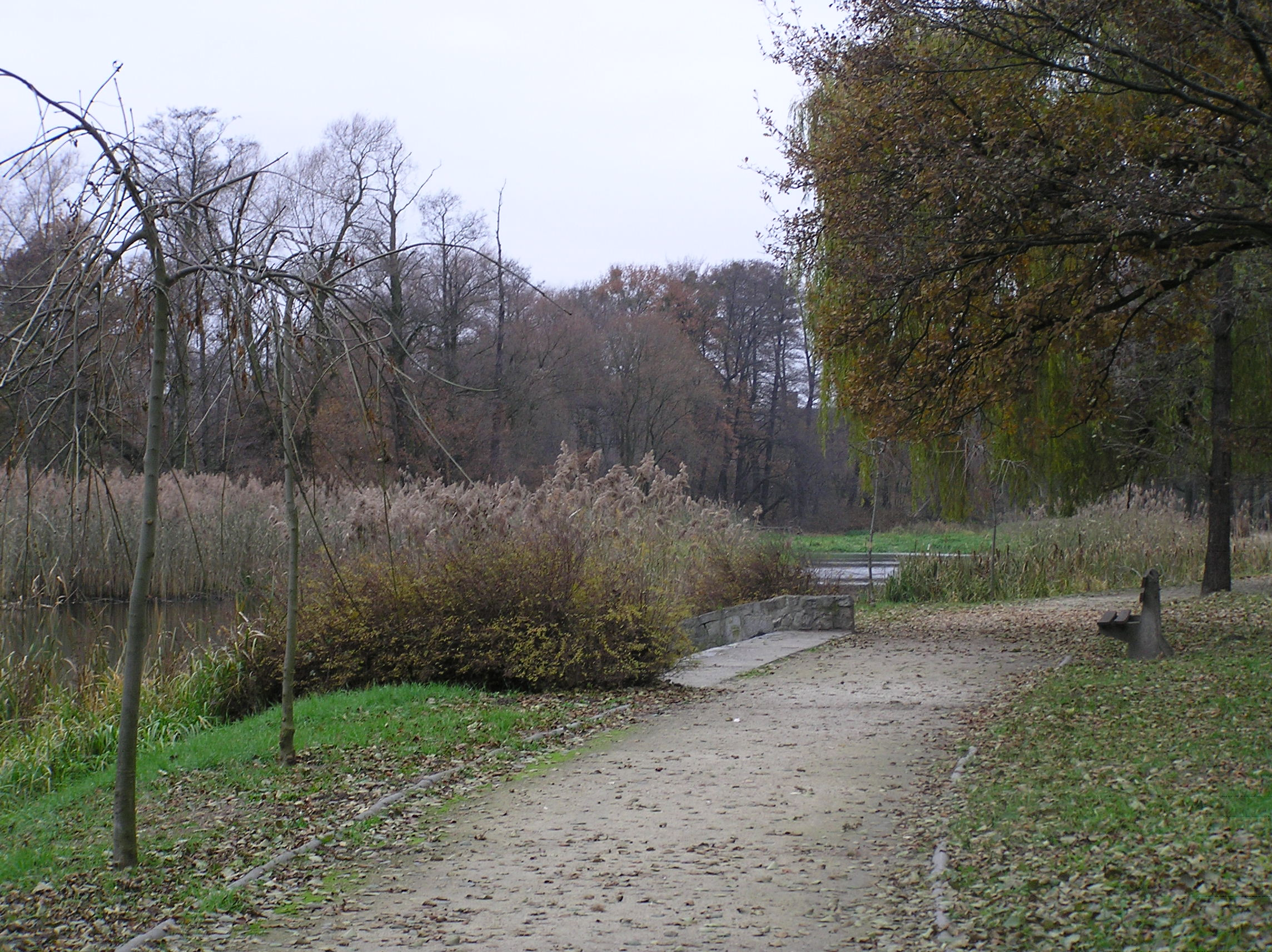 Wrocław, Park Wschodni